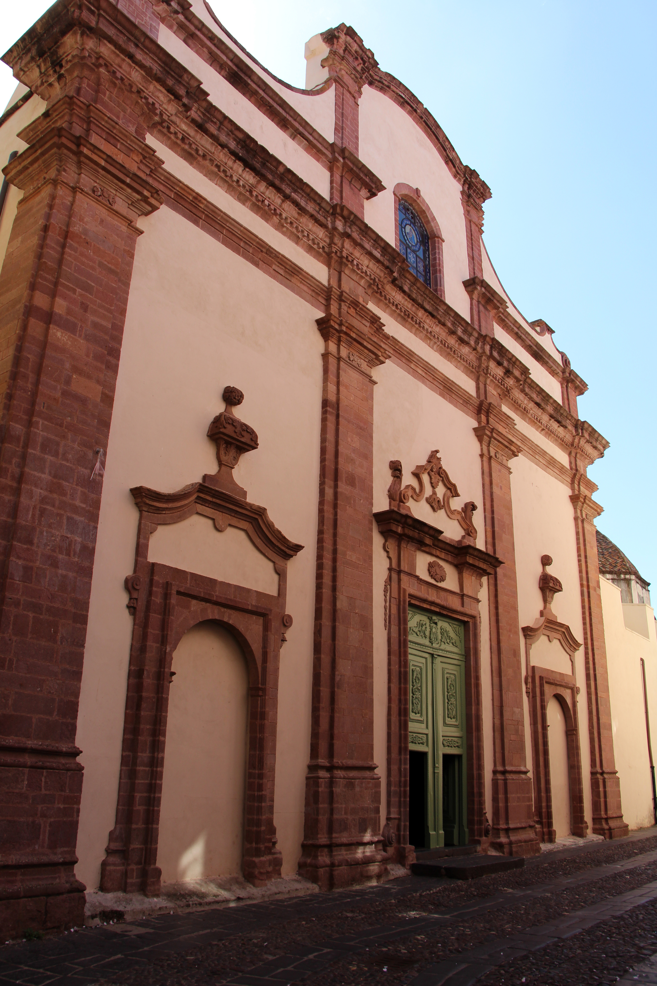 Centro storico This is a photo of a monument which is part of cultural heritage of Italy. The making of this document was supported by Wikimedia CH. (Submit your project!) For all the files concerned, please see the category Supported by Wikimedia CH.